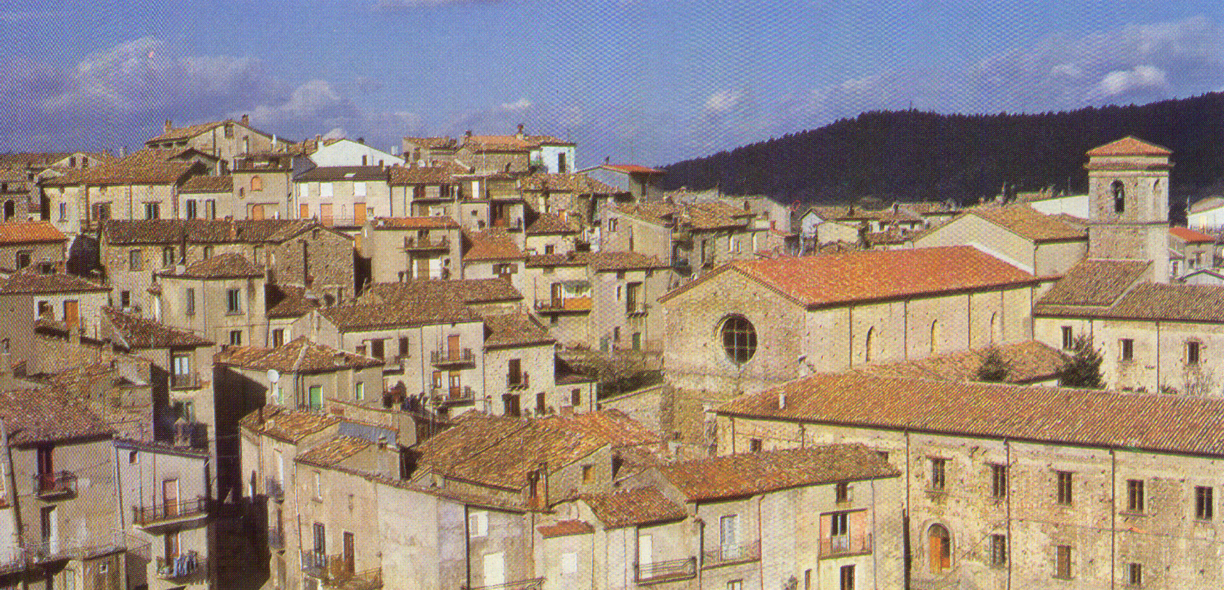 Abbazia Florense e centro storico